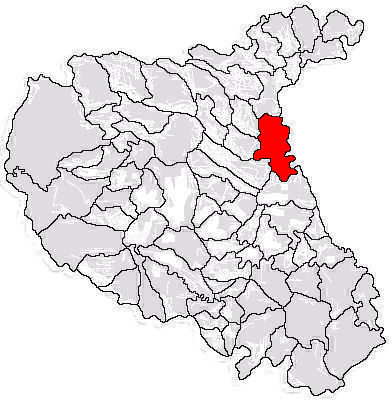 Categorie:Hărţi ale judeţului Vrancea